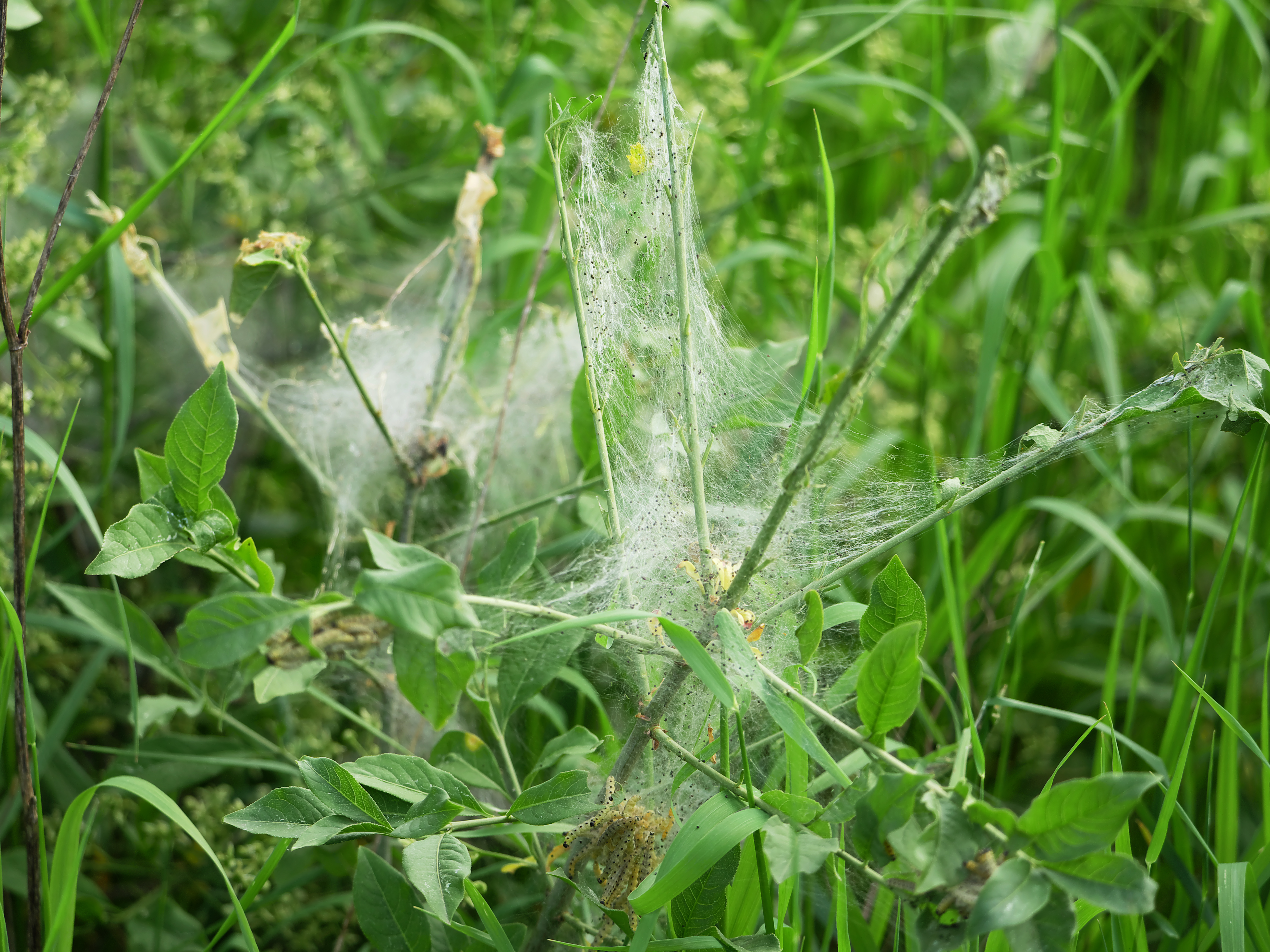 Landschaftsschutzgebiet „Diedersdorfer Heide und Großbeerener Graben“, Gespinst der Gespinstmotte mit Larven (unten in der Mitte)